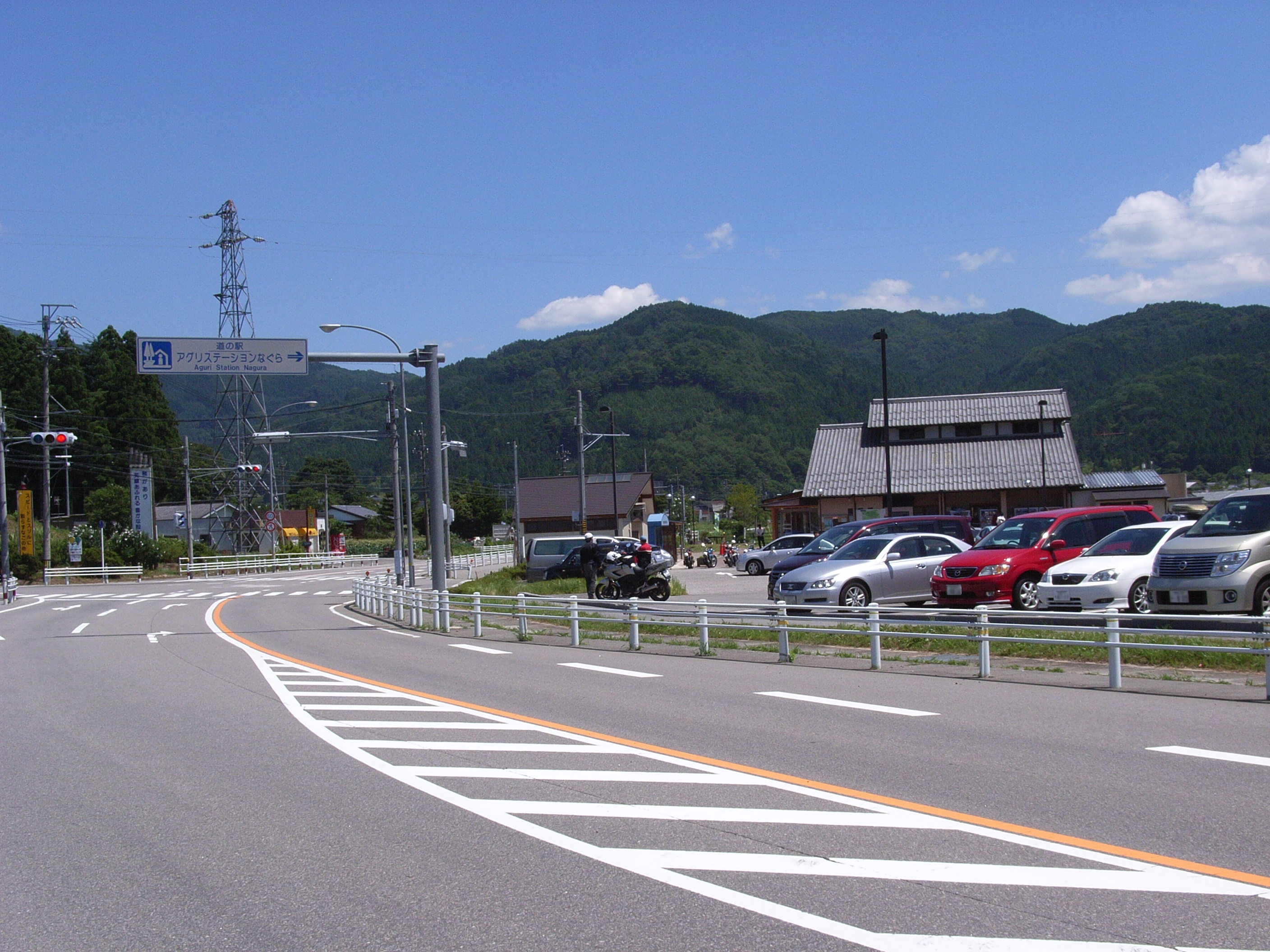 国道257号線道の駅アグリステーションなぐら。稲武側から撮影。愛知県北設楽郡設楽町。一部のナンバープレートにぼかし処理を加えている。